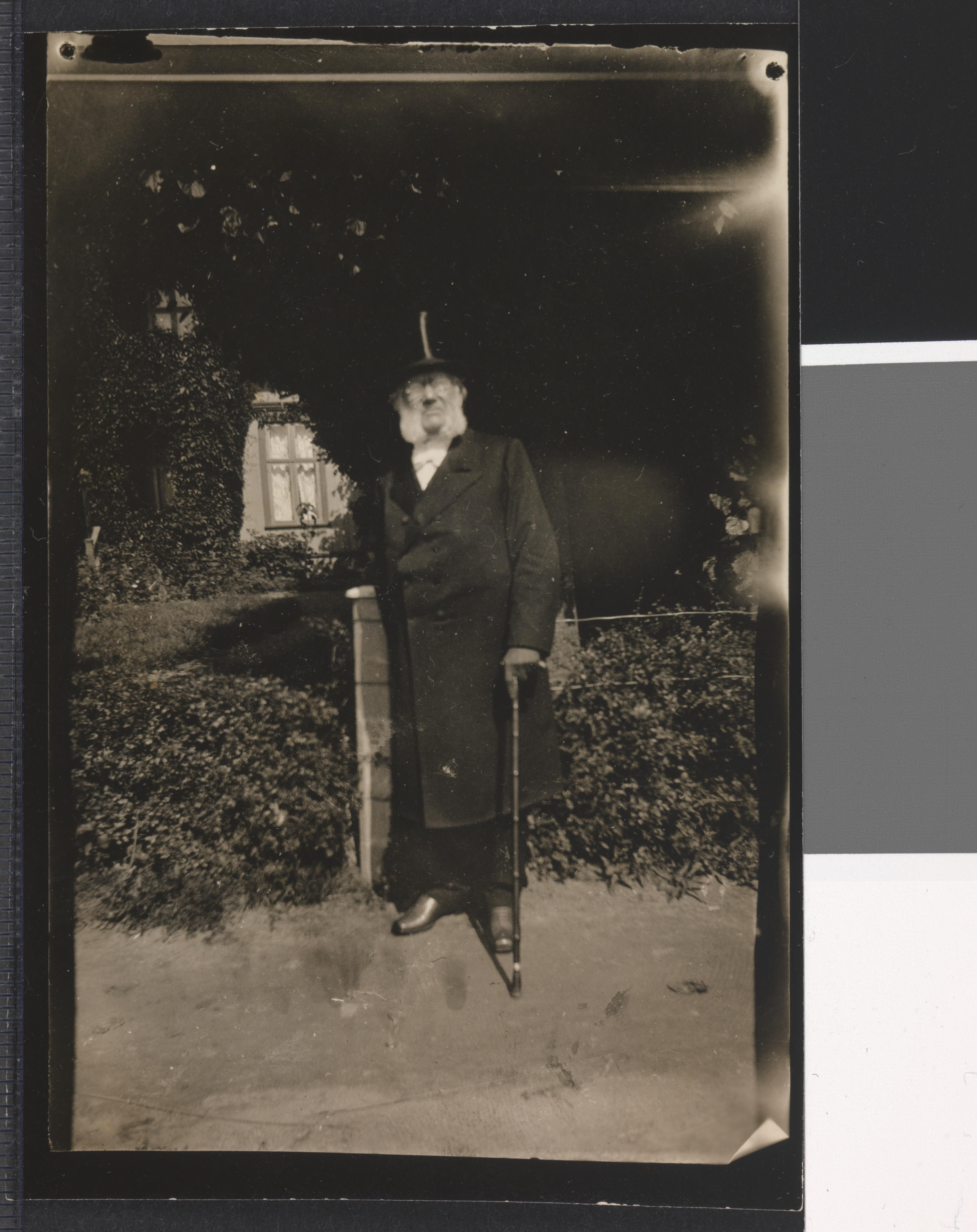 Bildet er hentet fra Nasjonalbibliotekets bildesamling Depicted person: Ibsen, Henrik